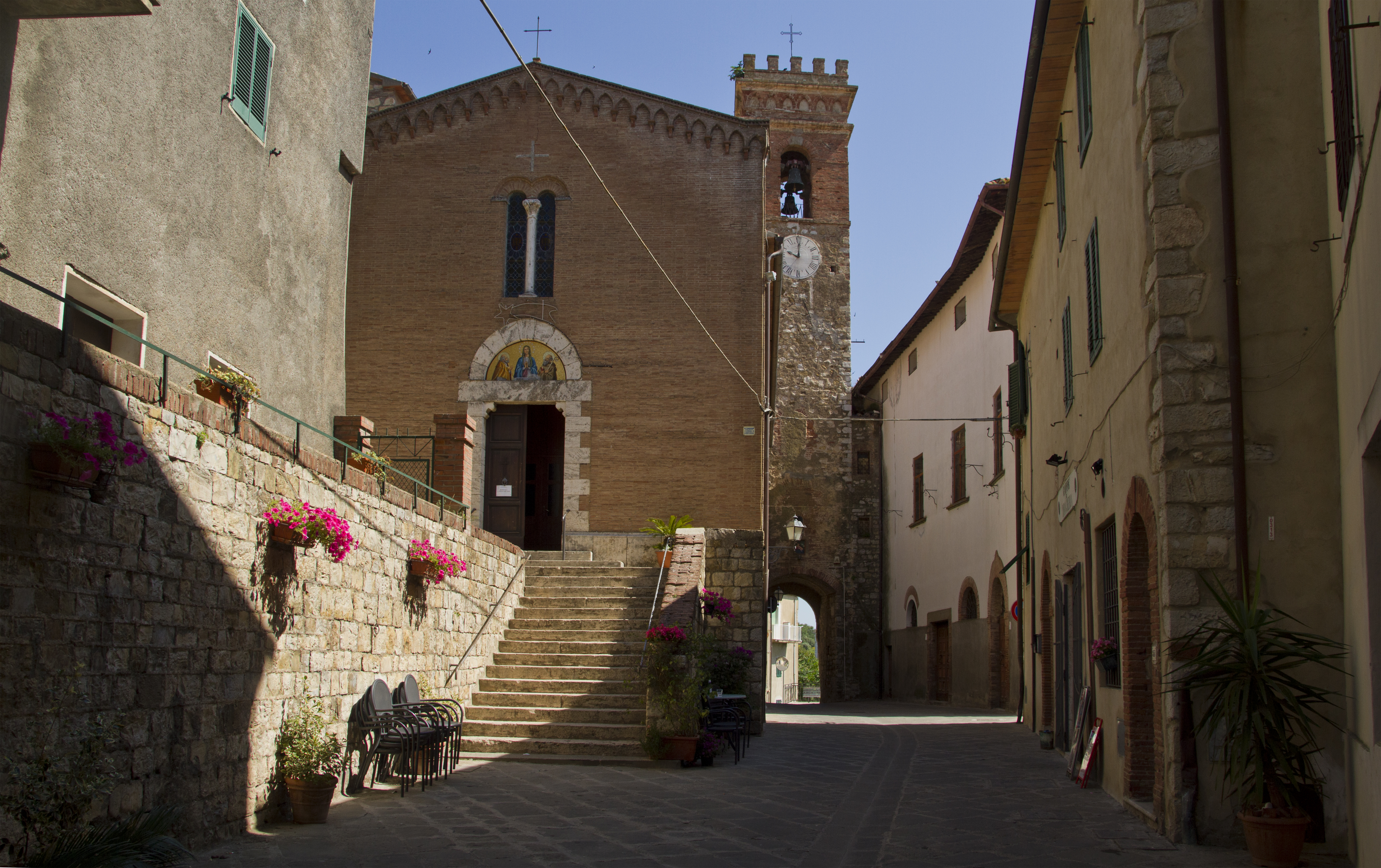 Gavorrano, Province of Grosseto, Italy